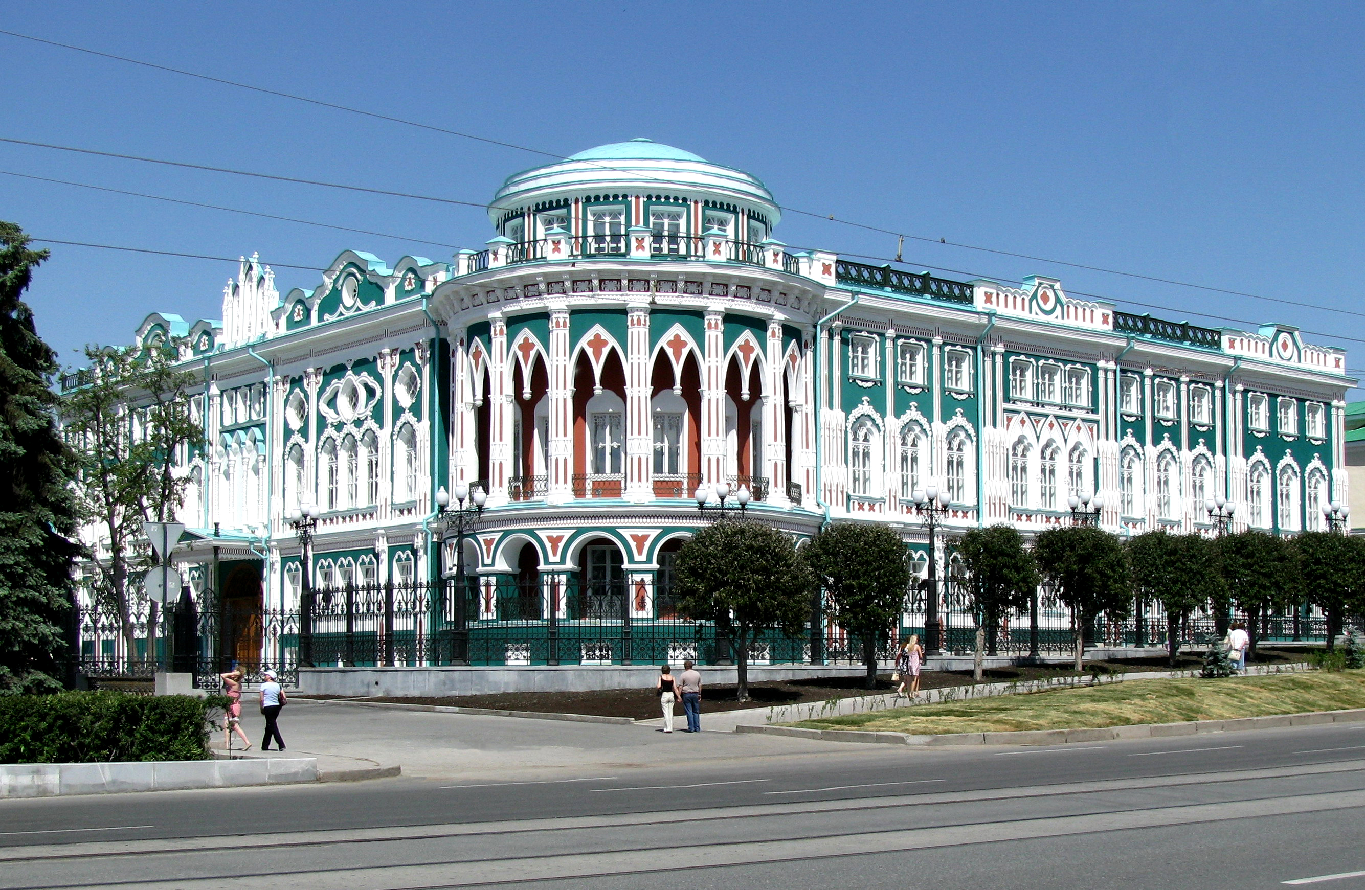 Дом горного чиновника Севастьянова в Екатеринбурге (построен в 1860-1866)